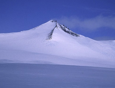 Barbeau Peak as seen from its eastern sideBarbeau Peak, Nunavut